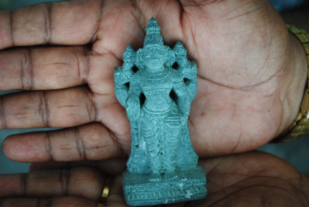 பச்சைக்கல் சிற்பங்கள்